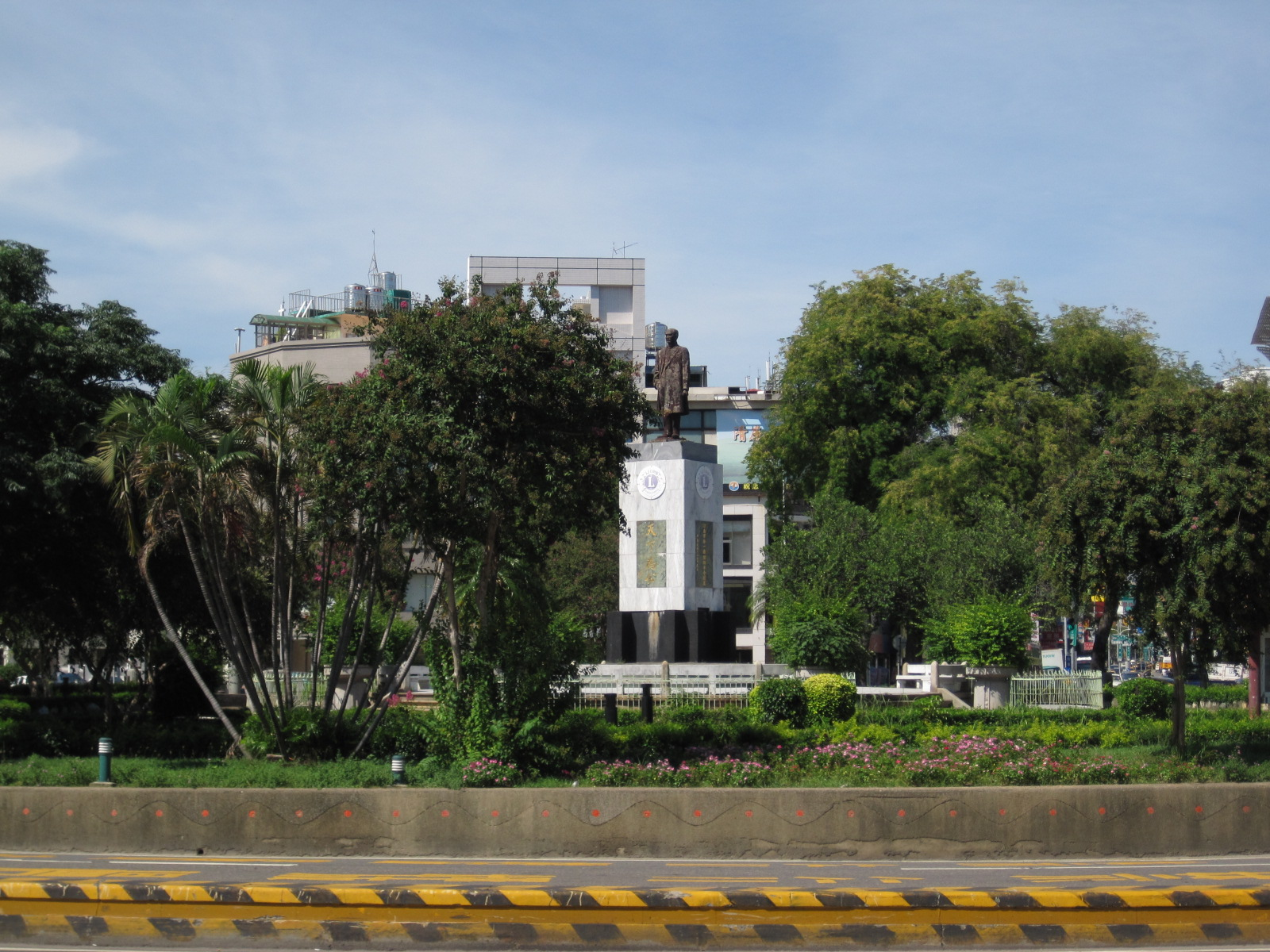 中文（台灣）: 臺南市湯德章紀念公園孫中山站像。